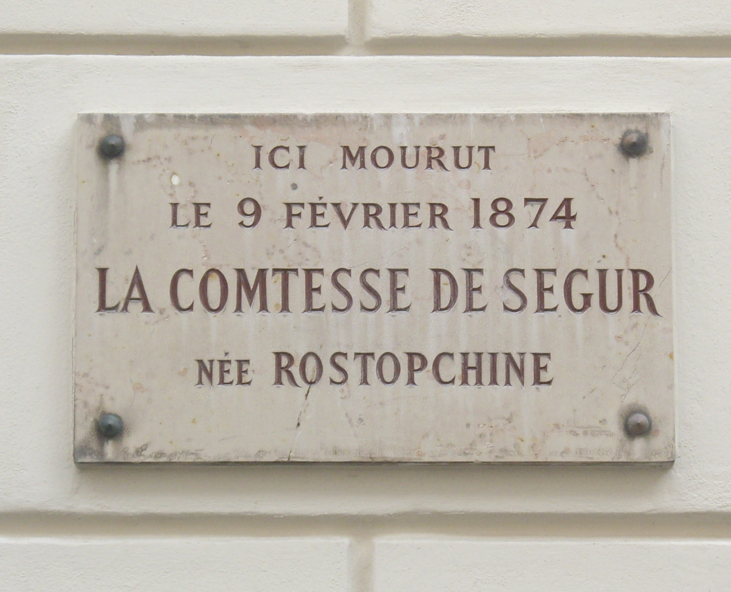 Plaque commémorative, 27 rue Casimir-Périer, Paris 7e. « Ici mourut le 9 février 1874 la comtesse de Ségur, née Rostopchine. »